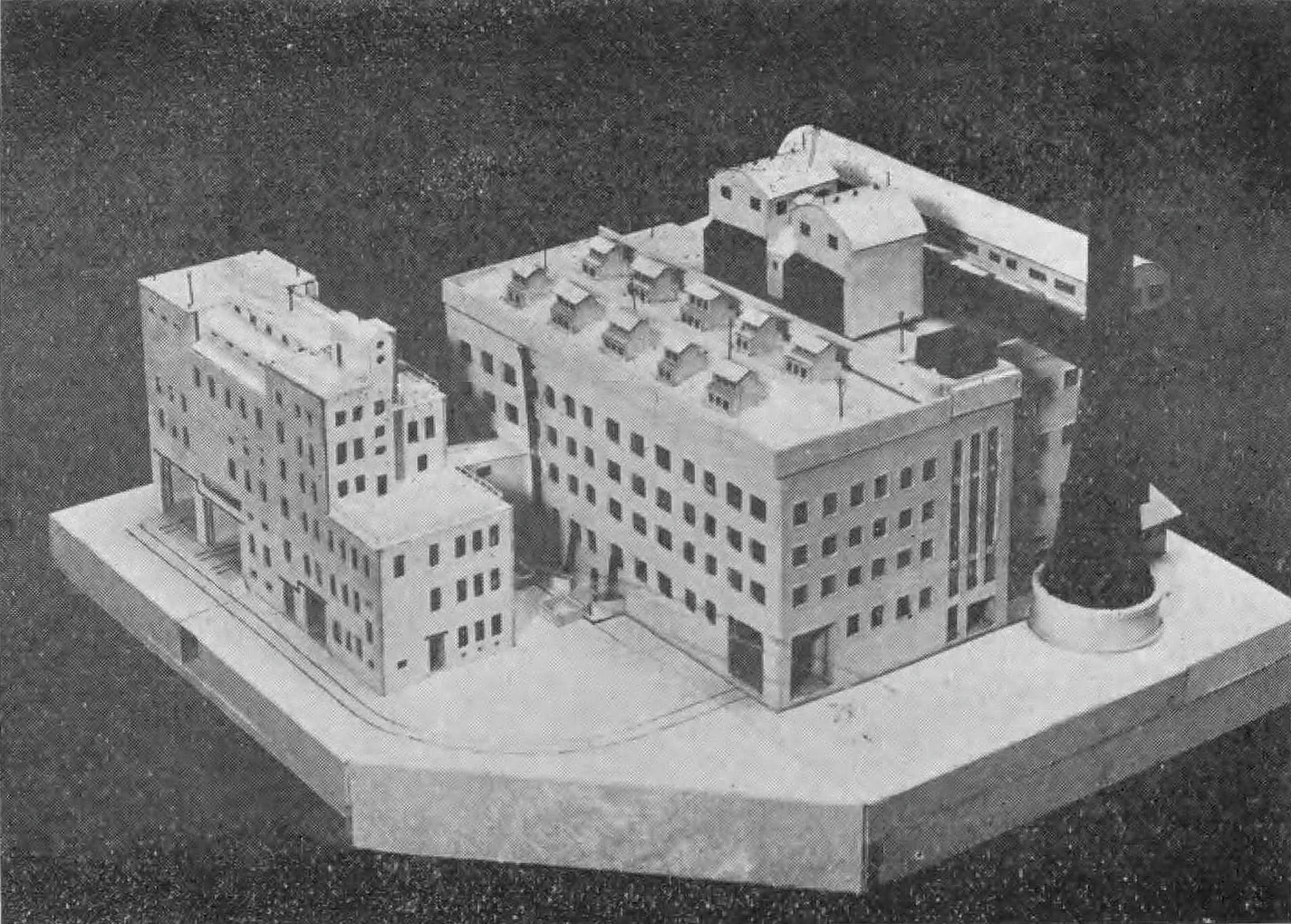 大阪市営安治川発電所（1938年竣工）の建築模型